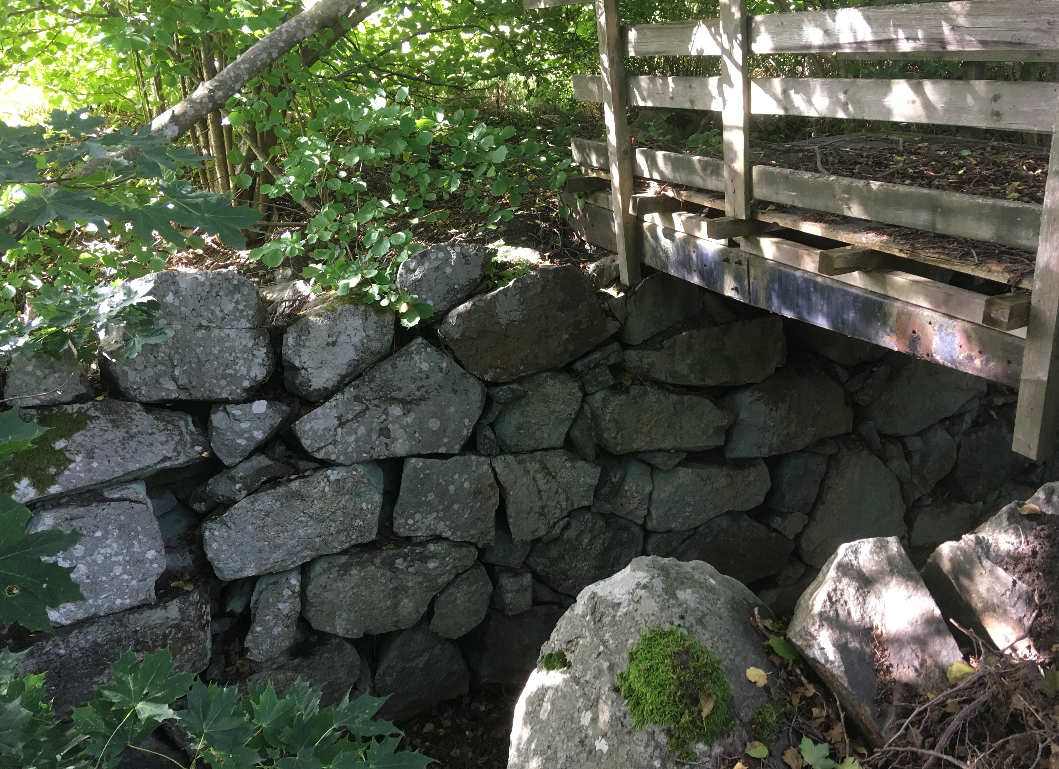 Lämningar efter Lissma vattenkvarn